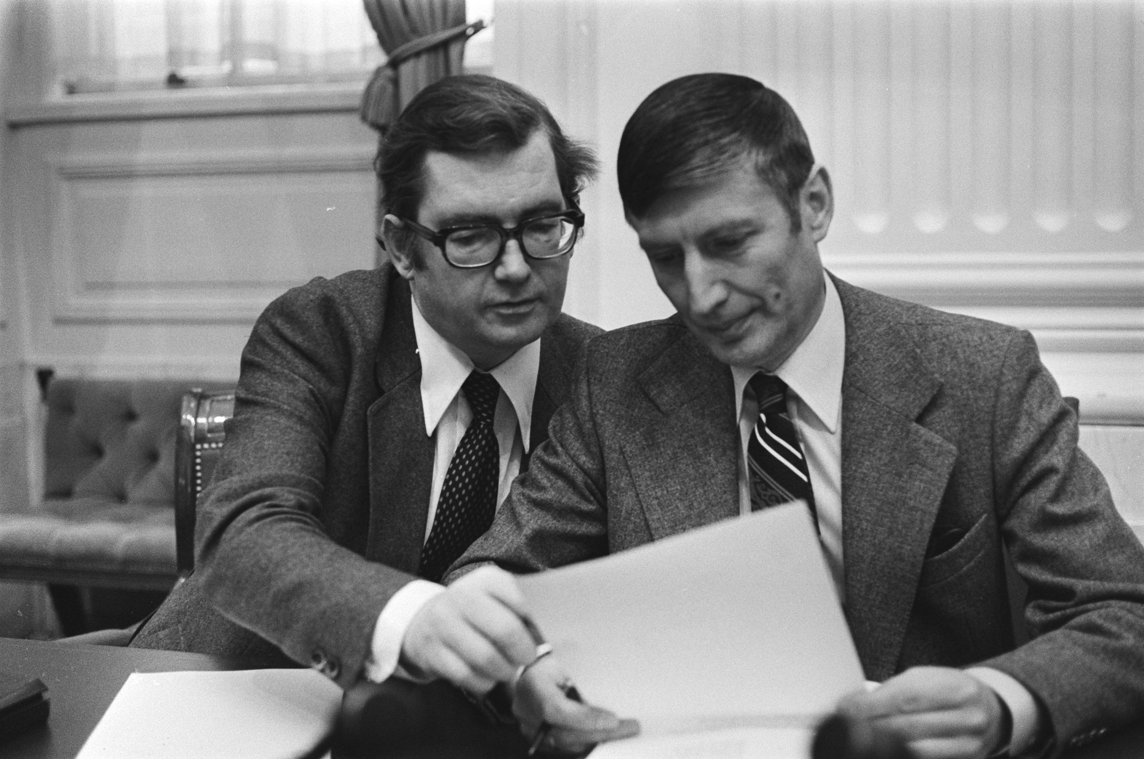 Collectie / Archief : Fotocollectie Anefo Reportage / Serie : Kabinetscrisis in 1977 aangaande de grondpolitiek Beschrijving : Minister Gruijters (D66) (l) en minister Van Agt (KVP) (r) Datum : 3 maart 1977 Locatie : Den Haag, Zuid-Holland Trefwoorden : kabinetscrises, ministers Persoonsnaam : Agt, Dries van, Gruijters, Hans Fotograaf : Peters, Hans / Anefo Auteursrechthebbende : Nationaal Archief Materiaalsoort : Negatief (zwart/wit) Nummer archiefinventaris : bekijk toegang 2.24.01.05 Bestanddeelnummer : 929-0556